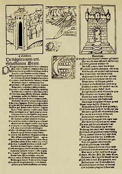 Lateinisch-deutsches Flugblatt von 1492 über den "Donnerstein von Ensisheim", ein Steinmeteorit, der im selben Jahr bei Ensisheim im Elsass niederging.